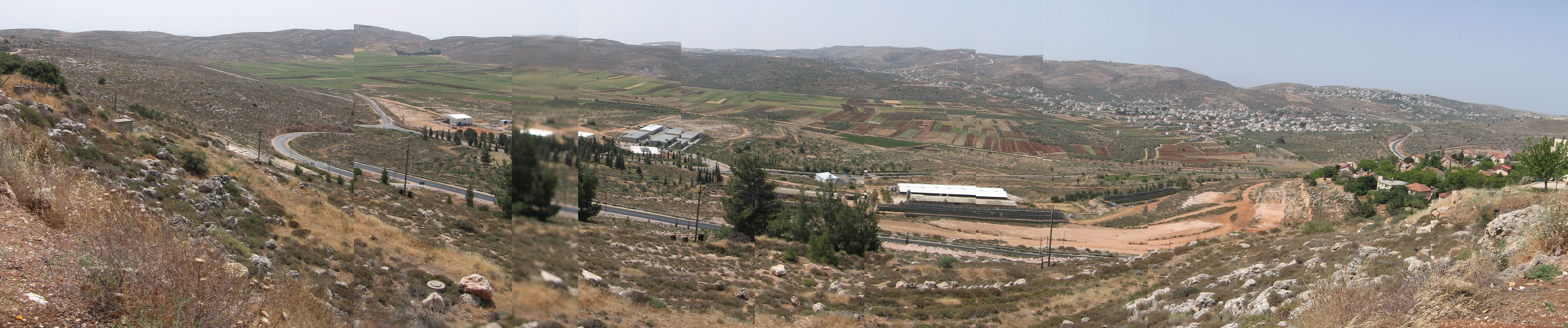 panorama